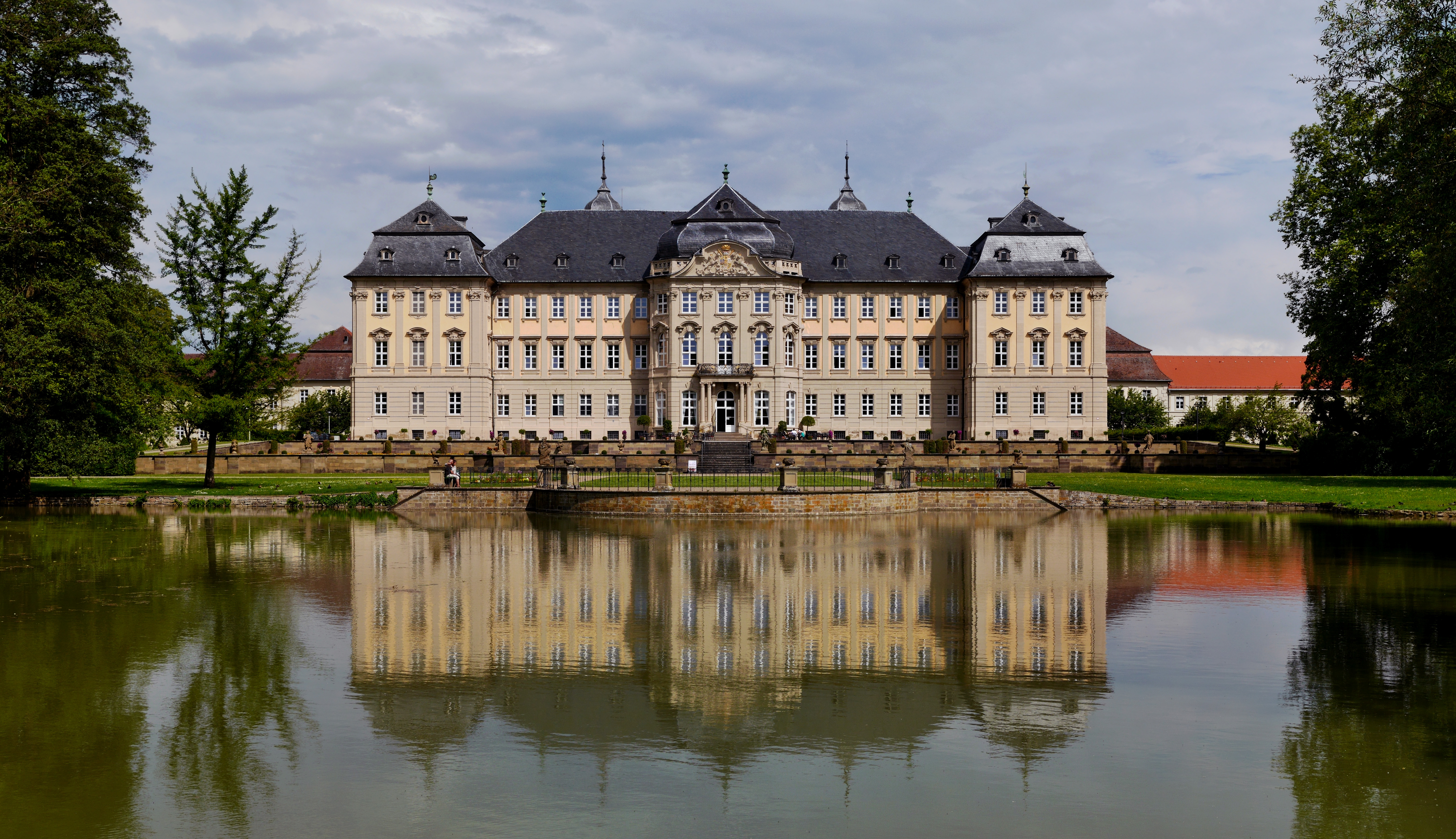 Das Schloss Werneck liegt in Werneck im unterfränkischen Landkreis Schweinfurt. Das Schloss wurde in den Jahren 1733 bis 1745 durch Balthasar Neumann als Sommerresidenz erbaut. Seit 1855 wird das Schloss als Heil- und Pflegeanstalt genutzt. Diese Datei wurde mit Hugin erstellt.